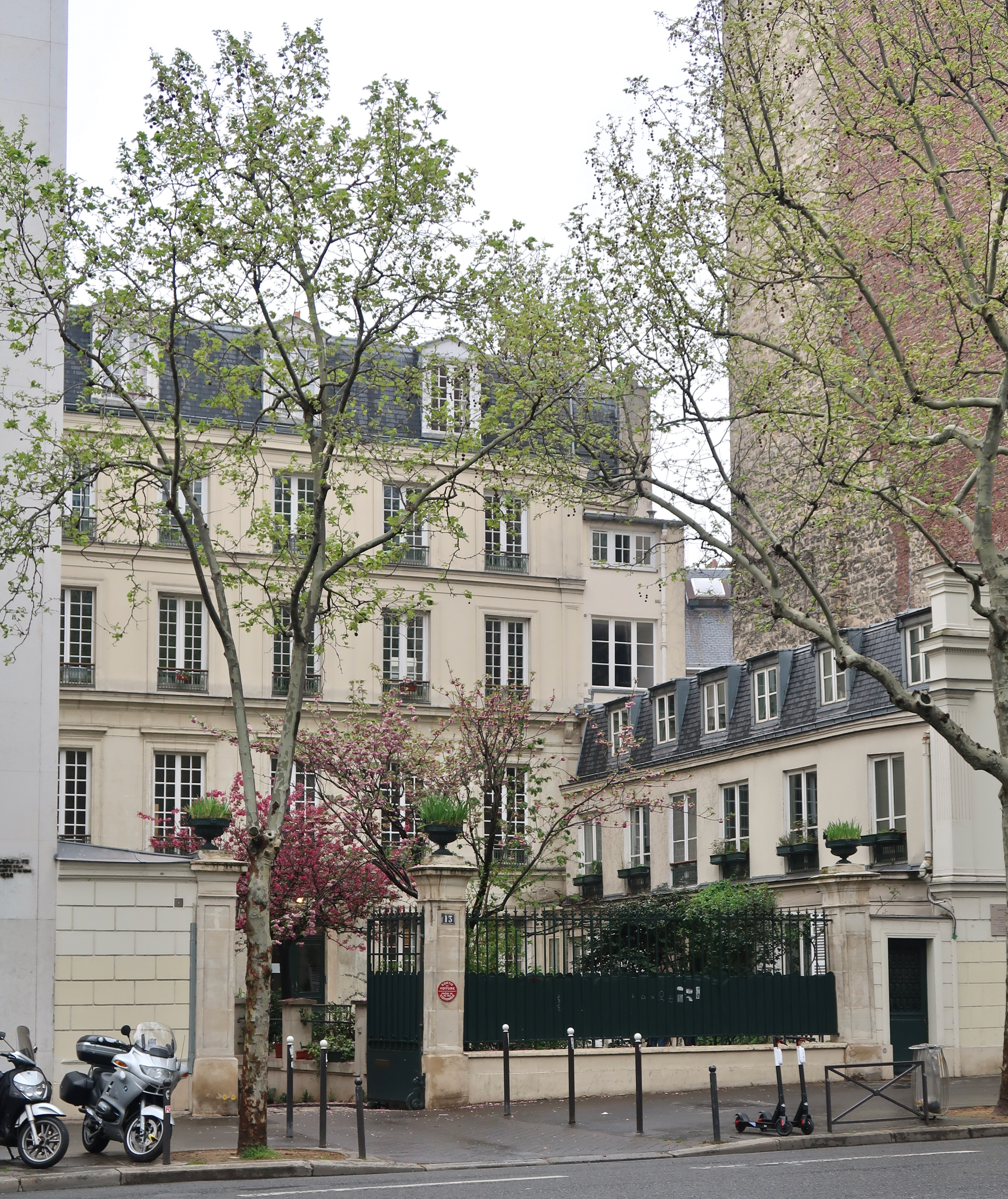 13 boulevard du Montparnasse (Paris, 6e).